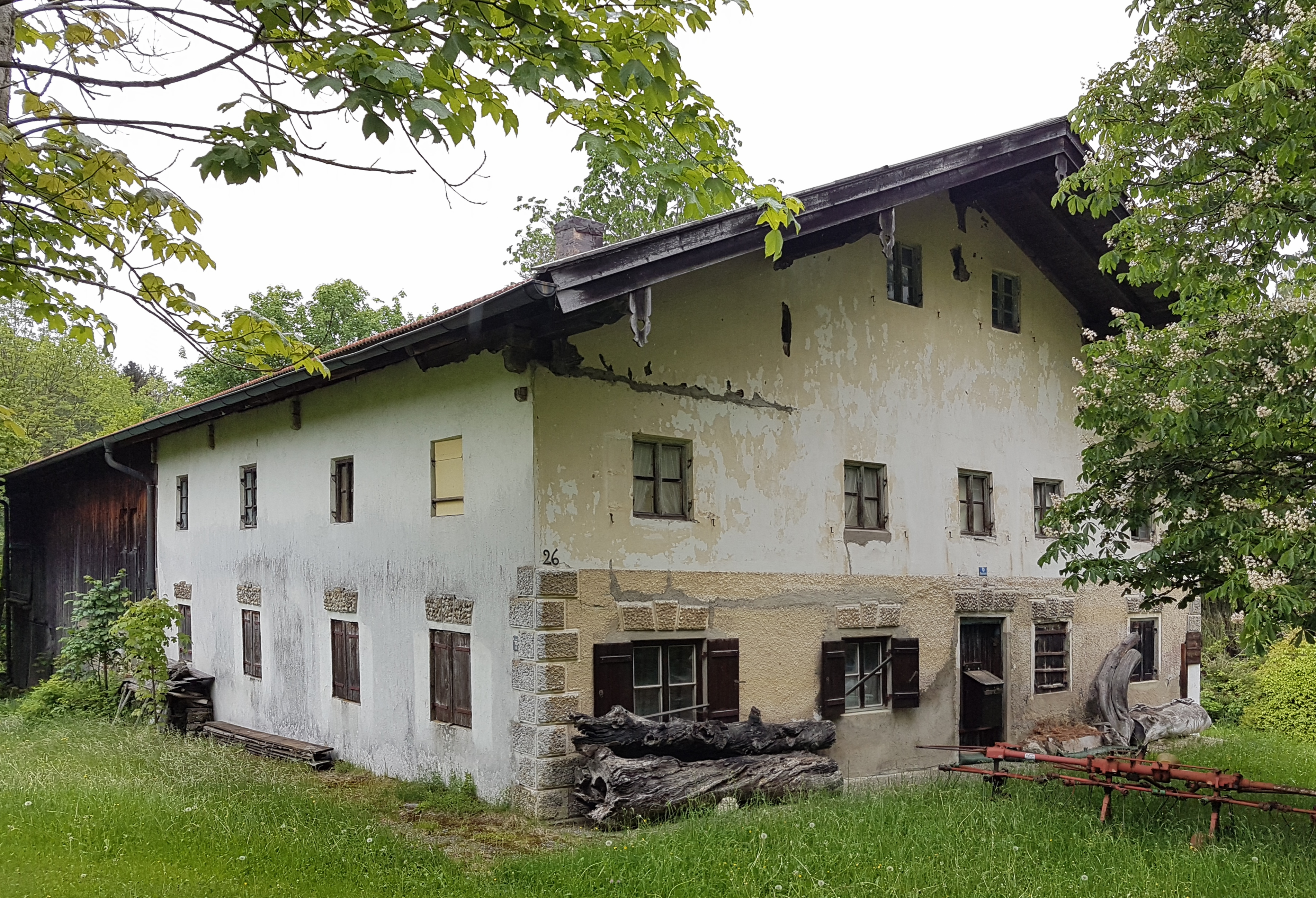 Kirnberg (Böbing), Geburtshaus des großen bayerischen Barockbildhauer Bartholomäus Steinle, Adresse: Steinleweg 26.